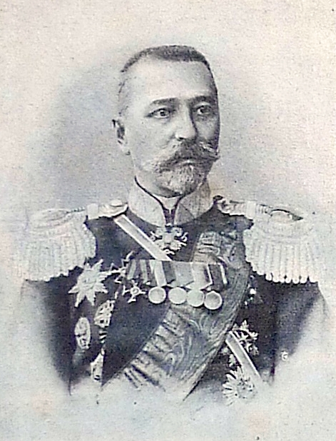 Дмитрий Васильевич Путята (1855—1915) — русский военачальник, генерал-лейтенант, Амурский военный губернатор.